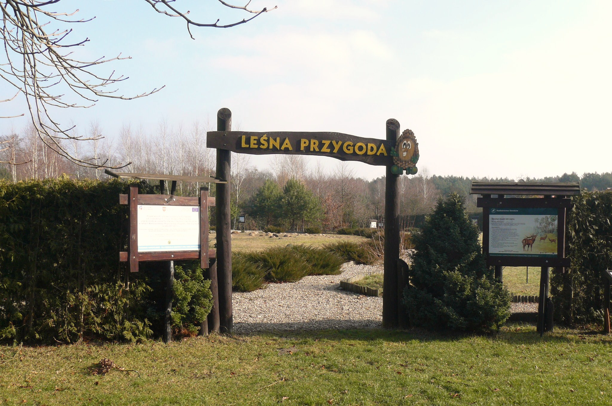 Leśny Ogród Edukacyjny Nadleśnictwa Sieraków w Bucharzewie.